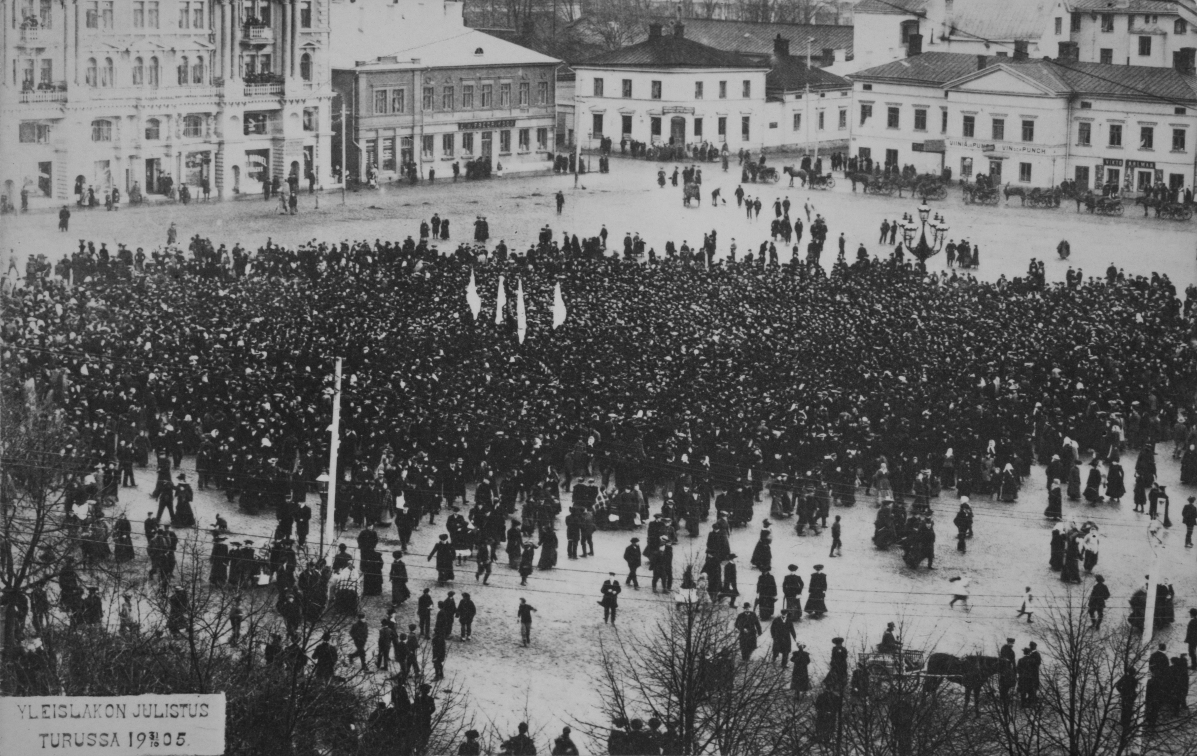 Yleislakon julistus Turun torilla 30.10.1905